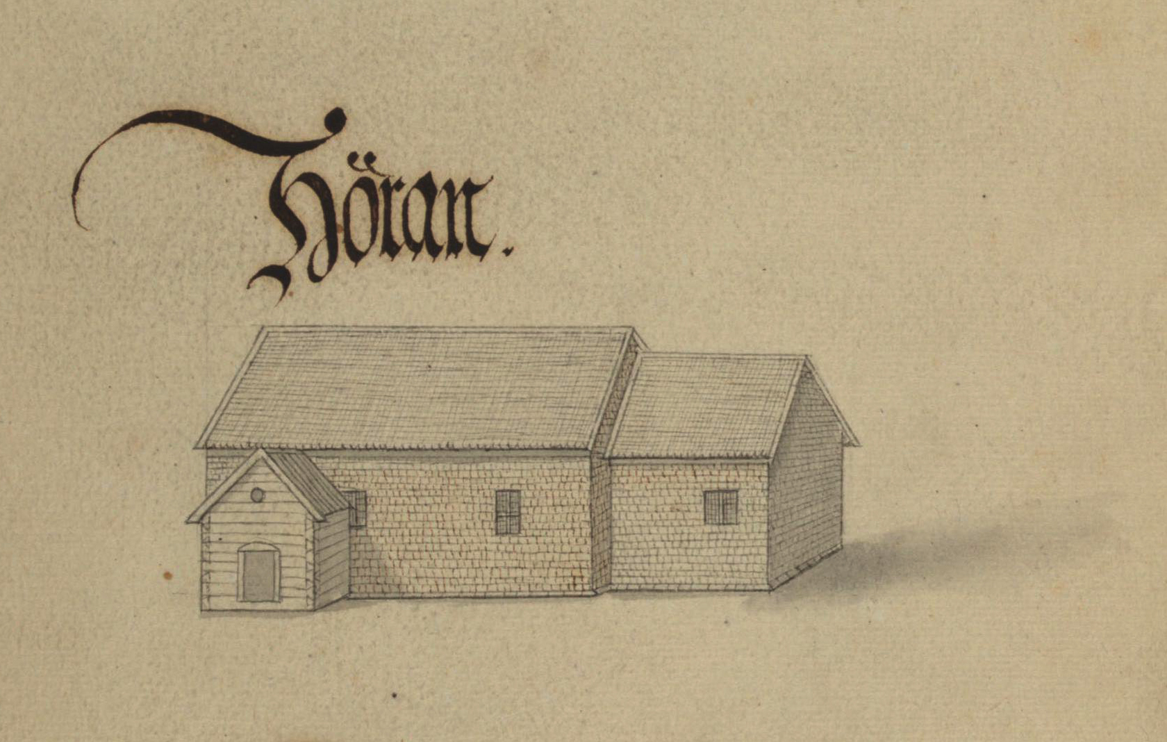 Höra kyrka, Järpås socken, Kållands härad. Kyrka, äldre, teckning ur Peringskiölds Monumenta, avfotograferad i färg.